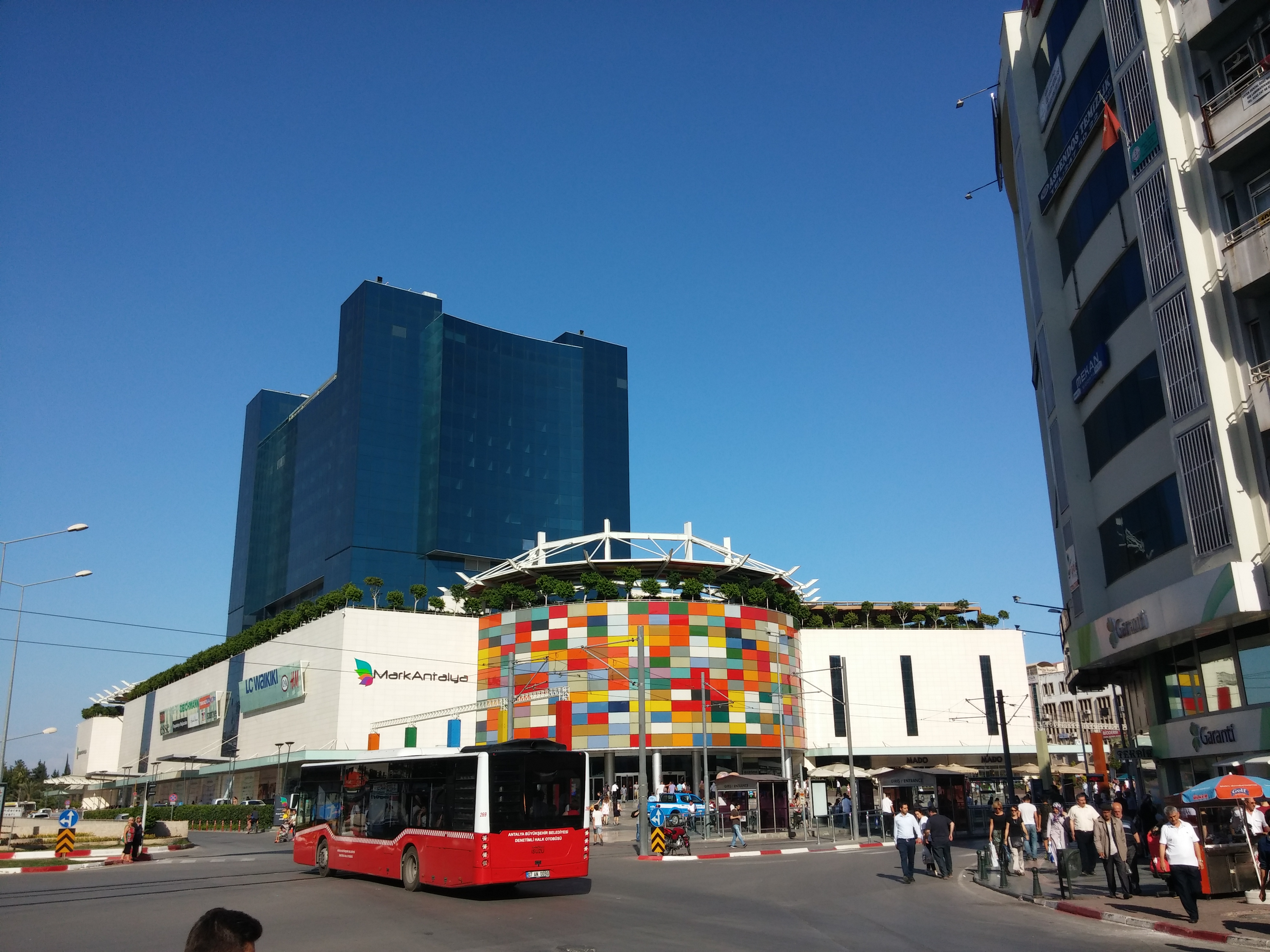 Antalya'nın Muratpaşa ilçesinde yer alan MarkAntalya alışveriş merkezi.